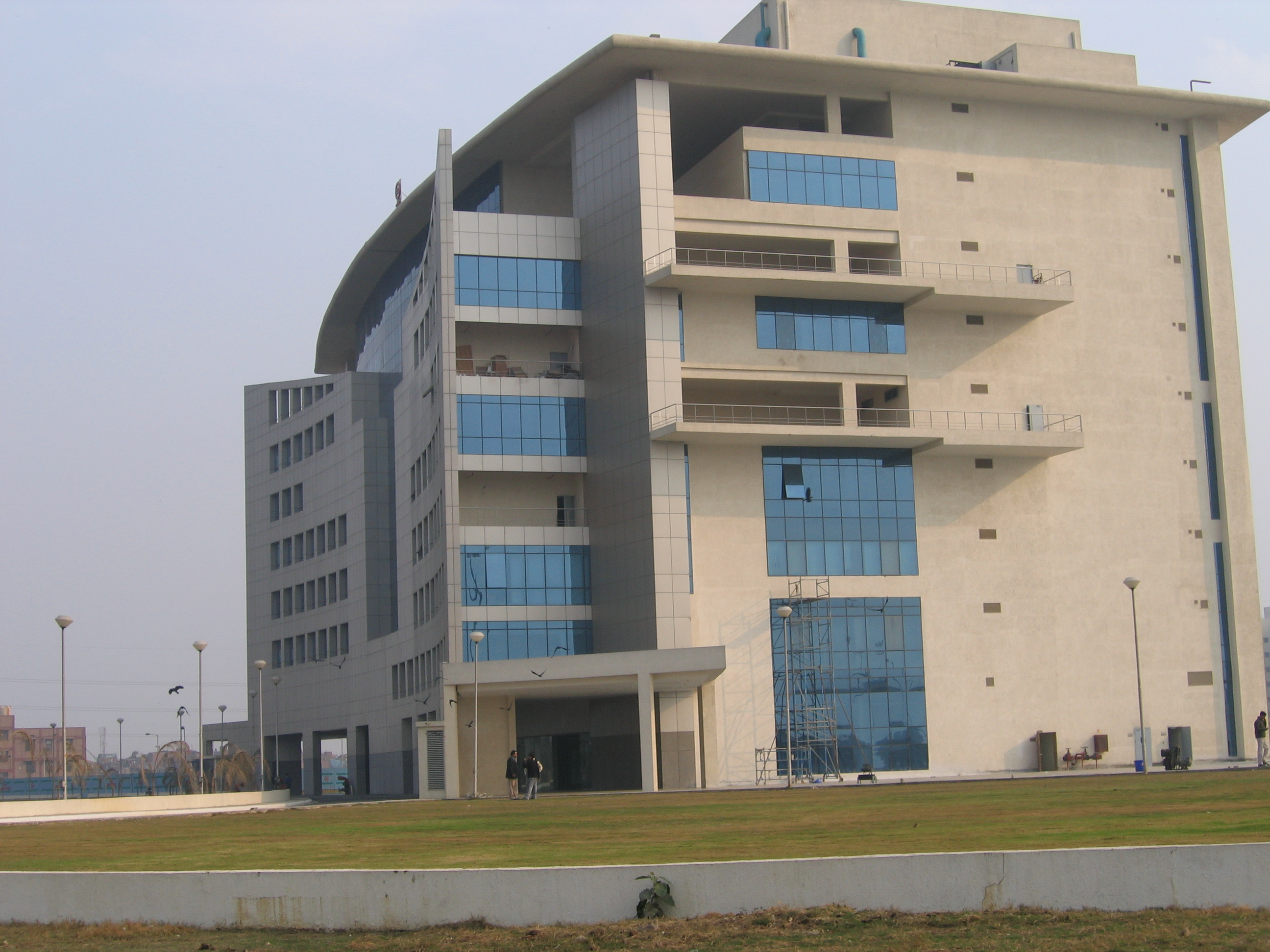 Delhi IT Park Block-1